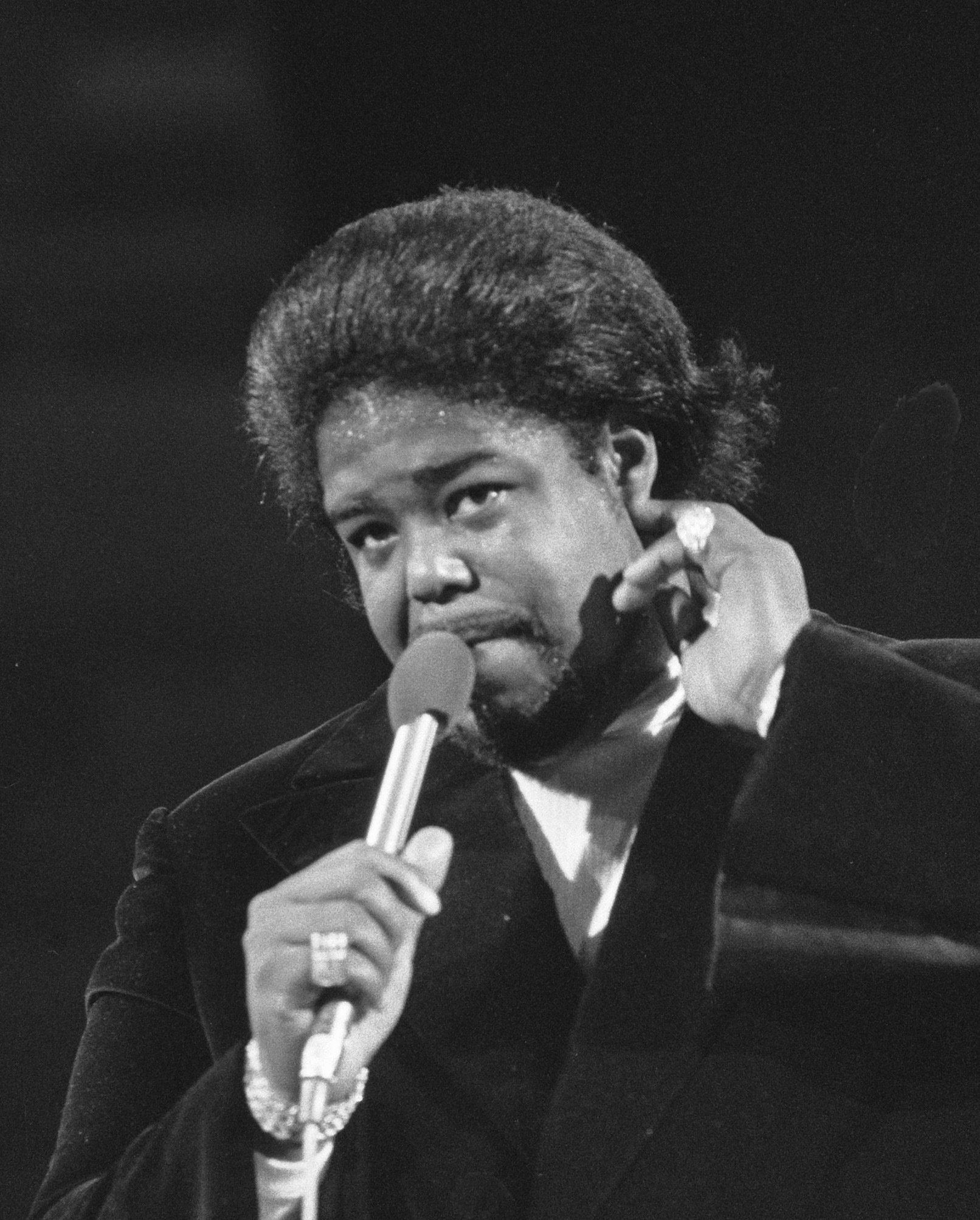 Collectie / Archief : Fotocollectie Anefo Reportage / Serie : Grand Gala du Disque in de RAI Beschrijving : Barry White Datum : 17 februari 1974 Locatie : Amsterdam, Noord-Holland Trefwoorden : festivals, zangers Persoonsnaam : White, Barry Instellingsnaam : RAI Fotograaf : Fotograaf Onbekend / Anefo Auteursrechthebbende : Nationaal Archief Materiaalsoort : Negatief (zwart/wit) Nummer archiefinventaris : bekijk toegang 2.24.01.05 Bestanddeelnummer : 927-0099